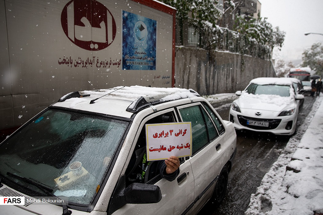 در جریان اعترضات مردمی به سهمیه‌بندی بنزین در ایران، توقف عمدی خودروها در انتقاد به گرانی بنزین در بعضی بزرگراه‌های تهران، موجب ترافیک سنگین و طولانی ماشین‌ها شده در این بزرگراه‌ها شده و صف طولانی از ماشین‌ها را متوقف کرده‌است. برخی رانندگان نیز با زدن بوق نسبت به گرانی بنزین اعتراض می‌کنند.